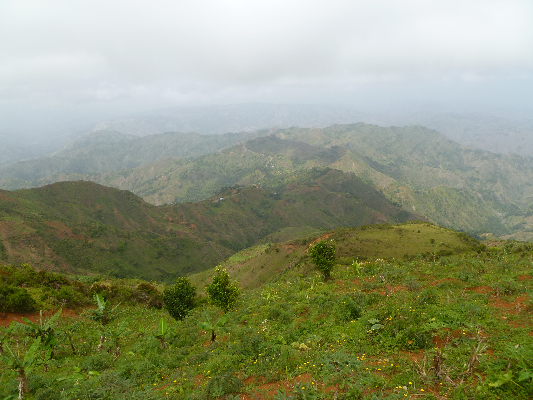 Beauséjour depuis le Morne Campan